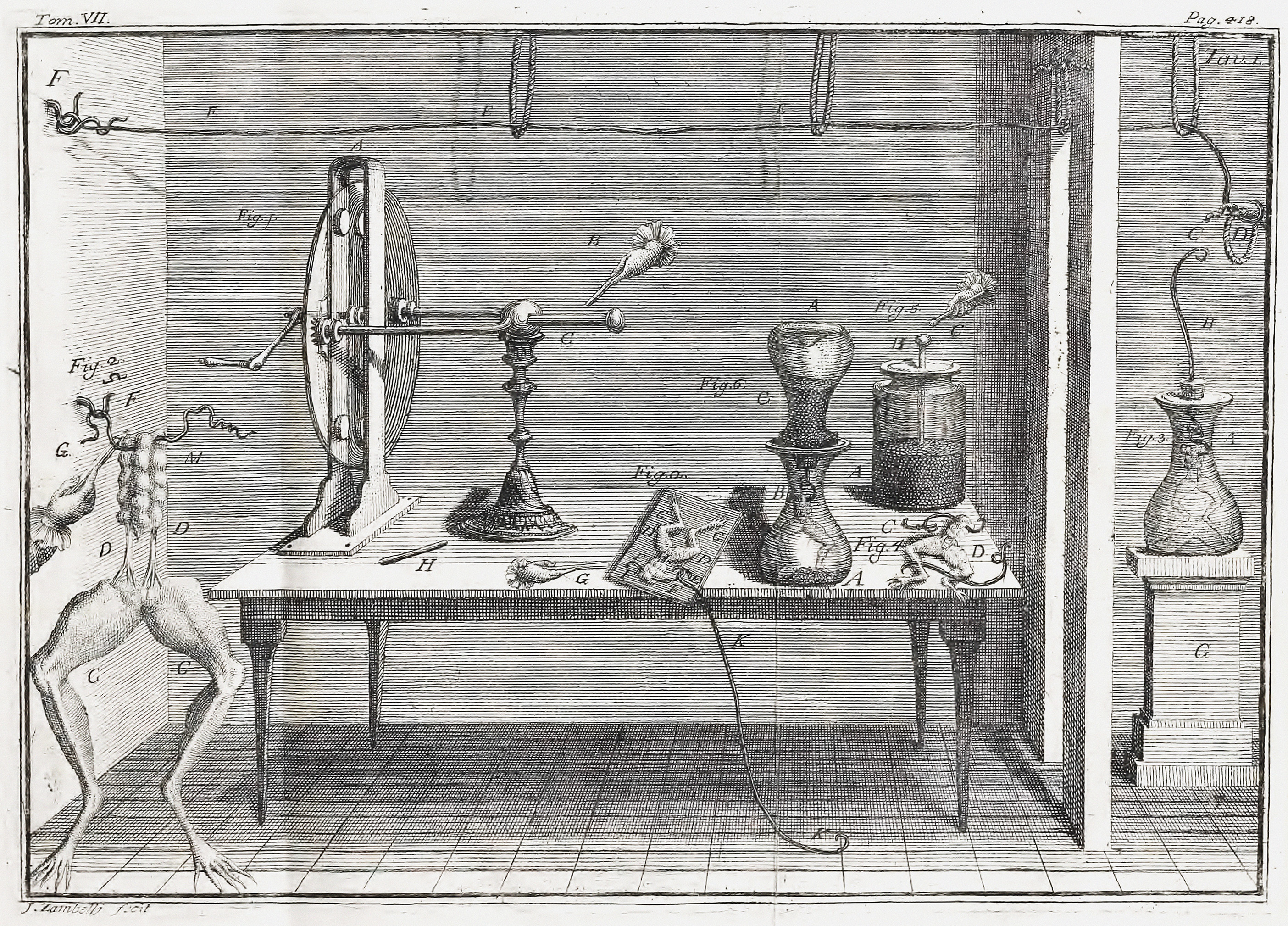 Luigi Galvani experiment on frogs legs. Original link (no more available)